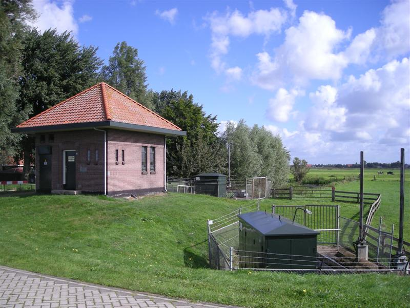 Gemaal J.Th Kemme bij Oldeouwer